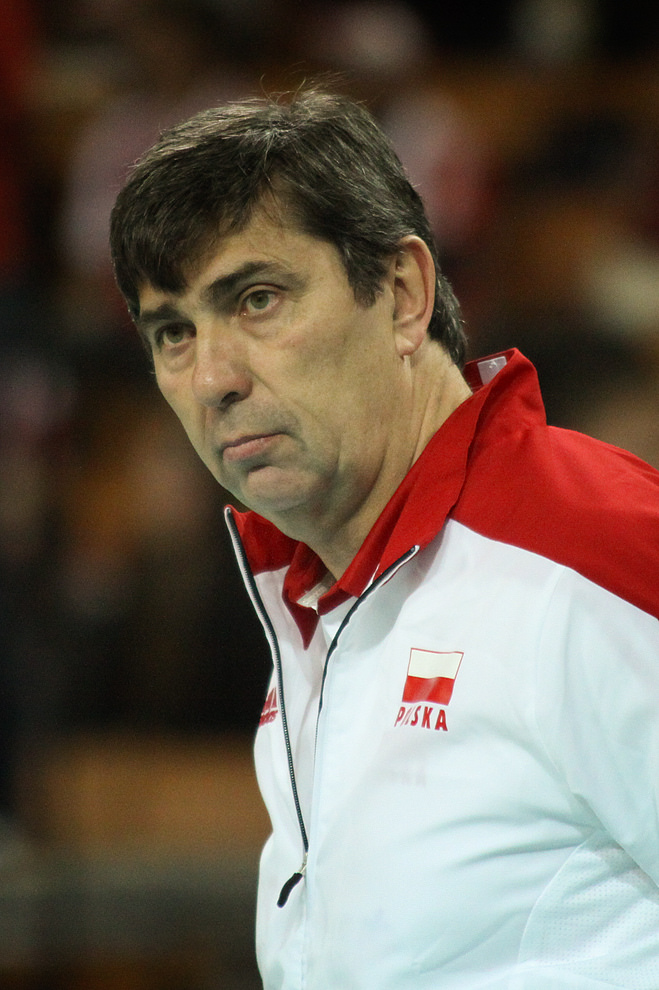 Polska - Łotwa, eliminacje ME 2015, 16.05.14r. Wrocław